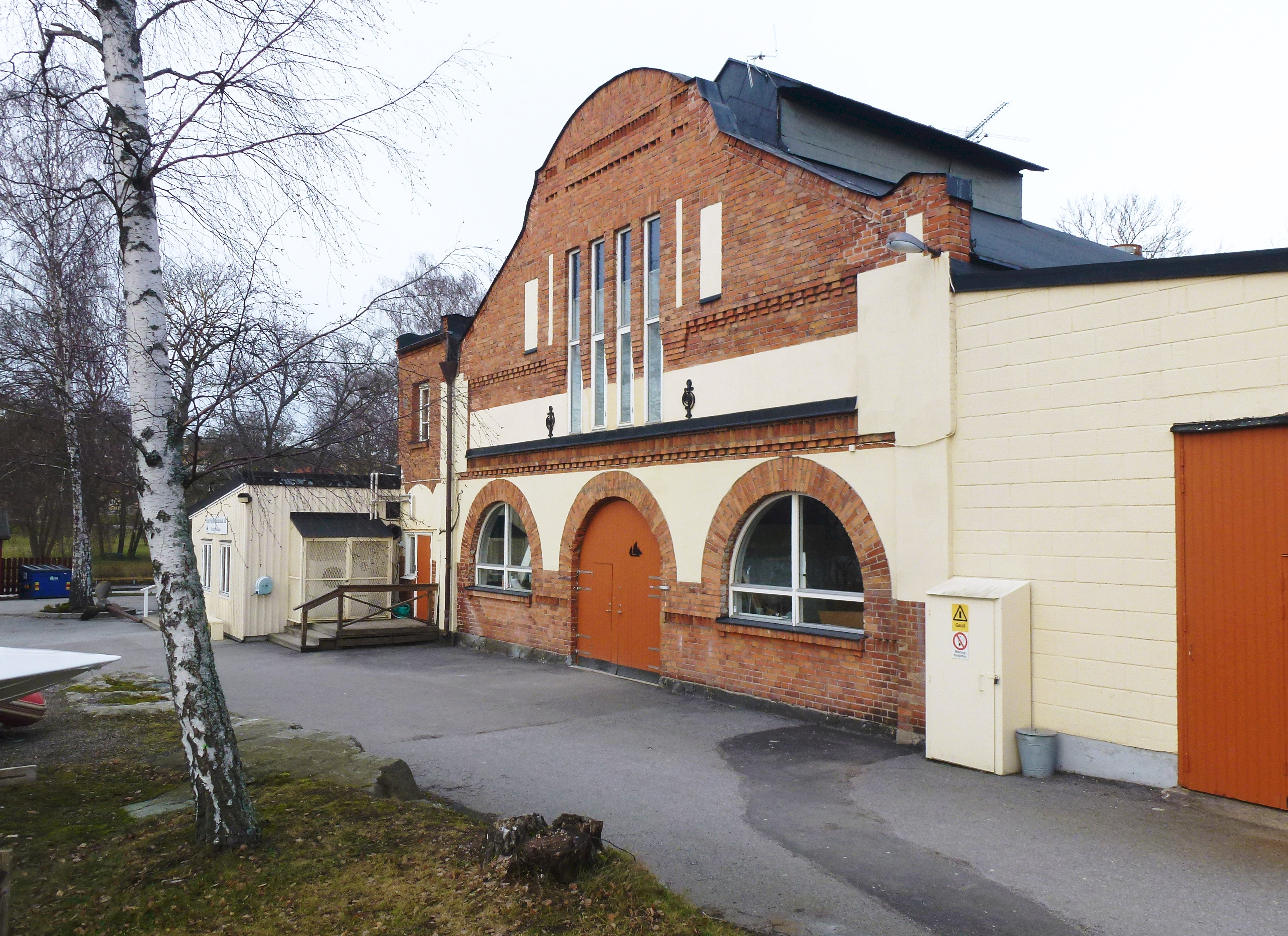 Djursholmsbanans elverk i Stocksunds hamn, byggt 1893 efter ritningar av SiggeCronstedt, idag Marina läroverket